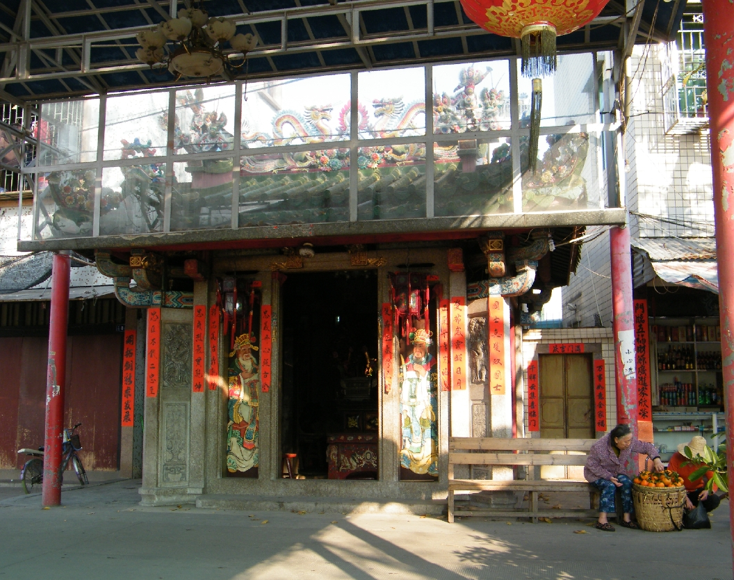 达濠 赤港西田路双忠古庙